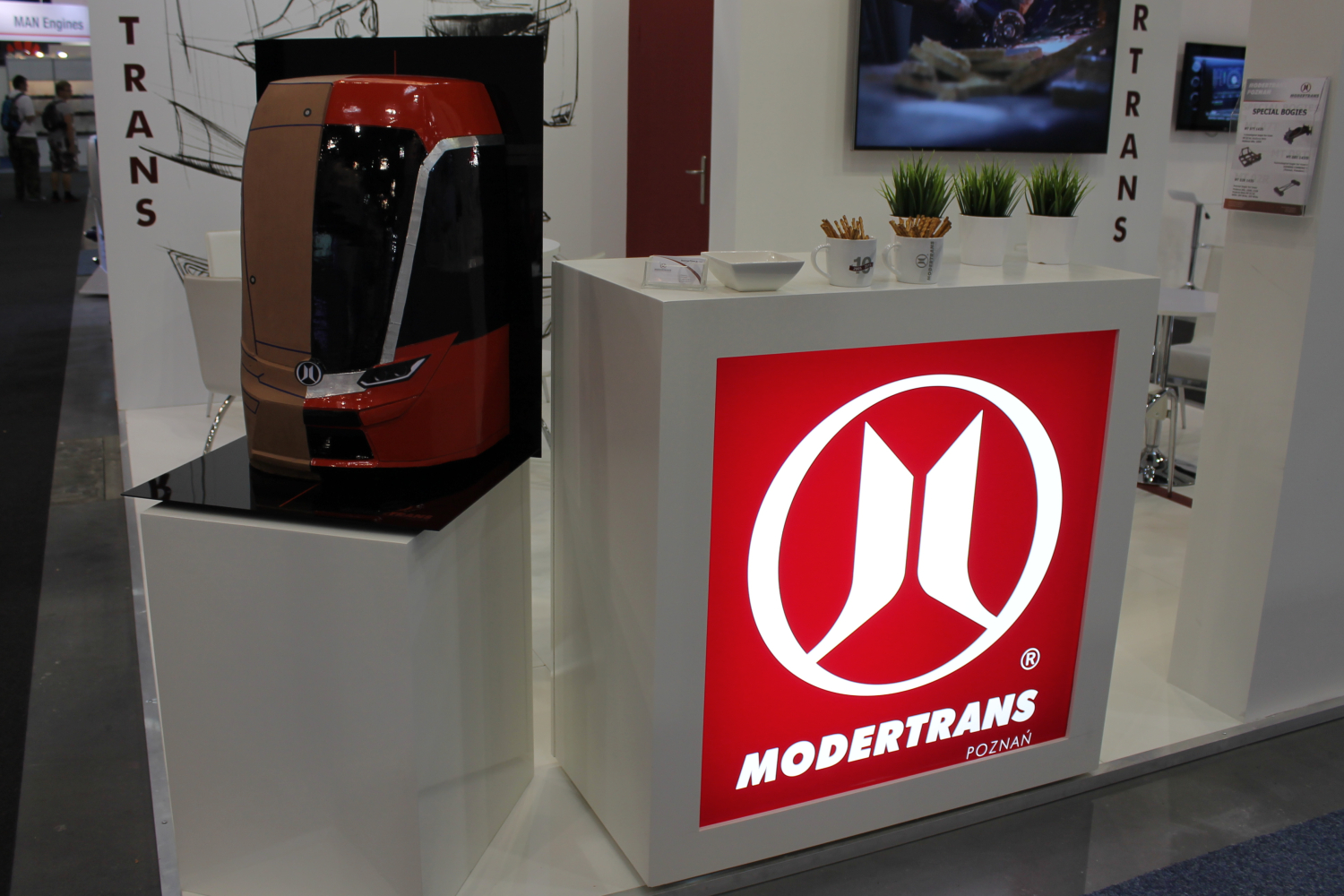 Stoisko Modertransu podczas targów Trako 2015. The making of this document was supported by Wikimedia Polska Association, within Wikigrant no. WG 2015-34. English | polski | +/−